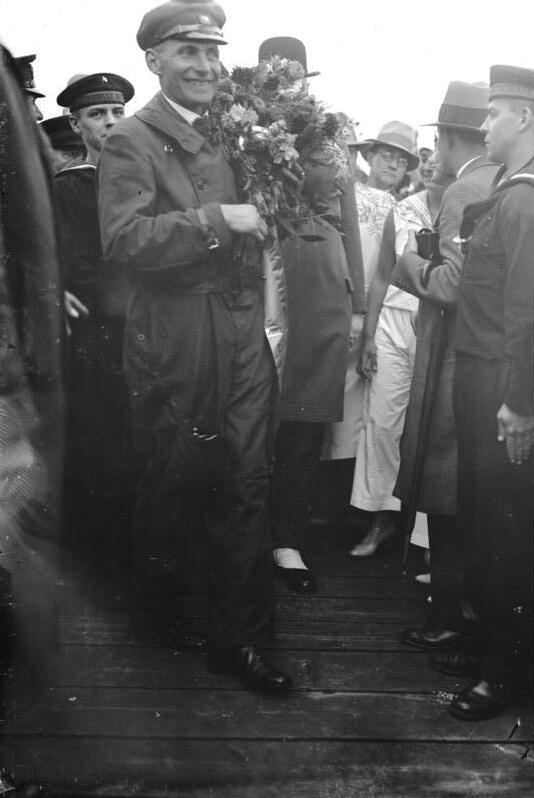 Der jubelde Empfang des deutschen Ozean-Bezwingers von Gronau auf dem Templiner See in Potsdam! Der Ozeanbezwinger von Gronau , blumengeschmückt nach seiner Ankunft in Potsdam.